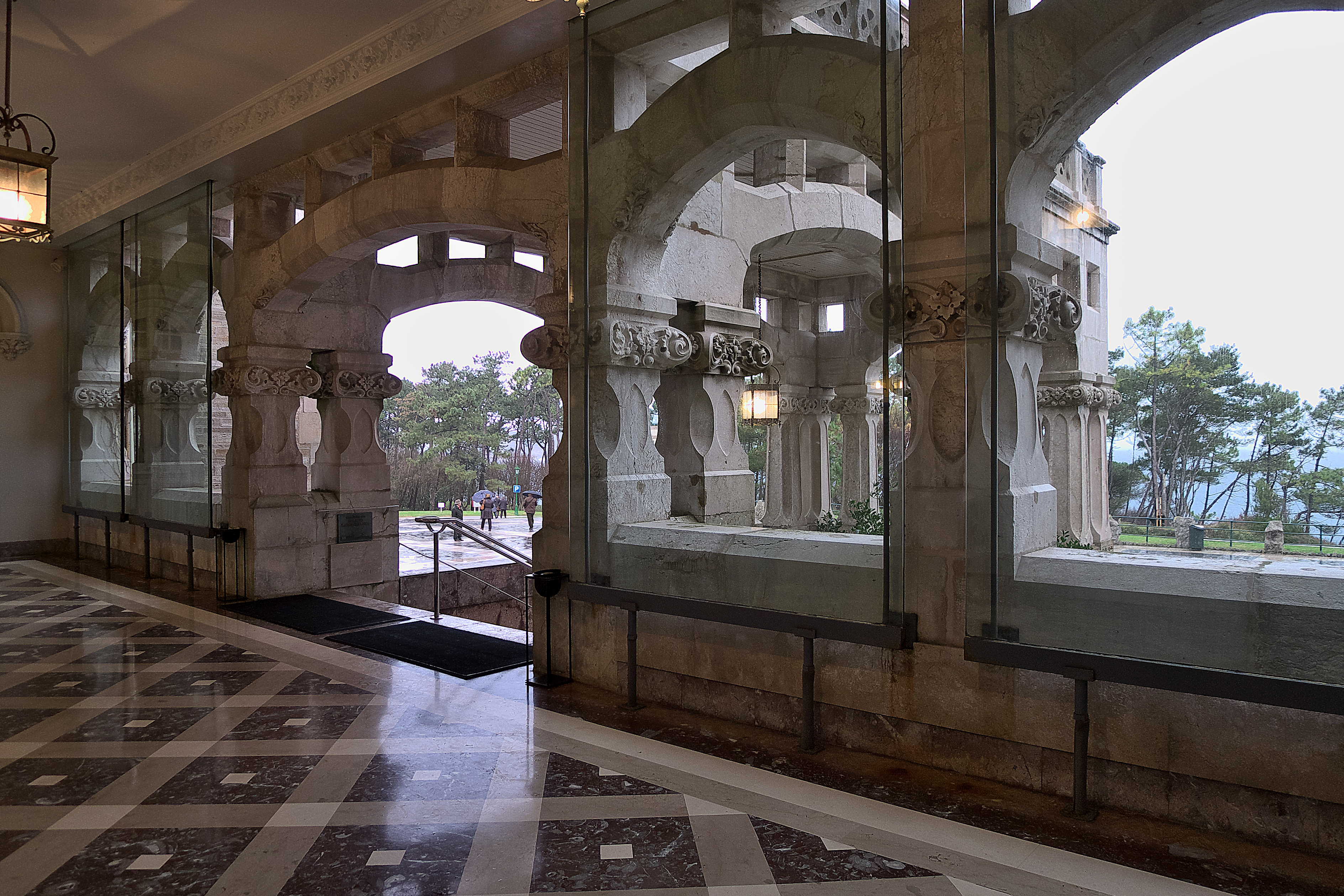 Detalle de la entrada principal. En 1912, Gonzalo Bringas Vega y Javier González de Riancho, terminan la obra.